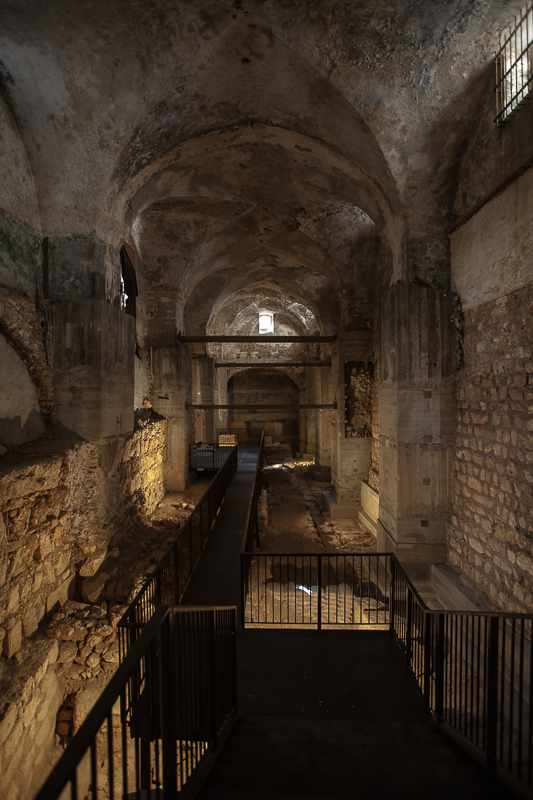 קישלֶה הוא כינוי לבית המעצר שהוקם בעיר העתיקה בירושלים בתקופה העות'מאנית. המבנה שוכן בצמוד למגדל דוד מדרום, בשולי הרובע הארמני, ומשמש כיום את מטה מרחב דוד של מחוז ירושלים של משטרת ישראל.